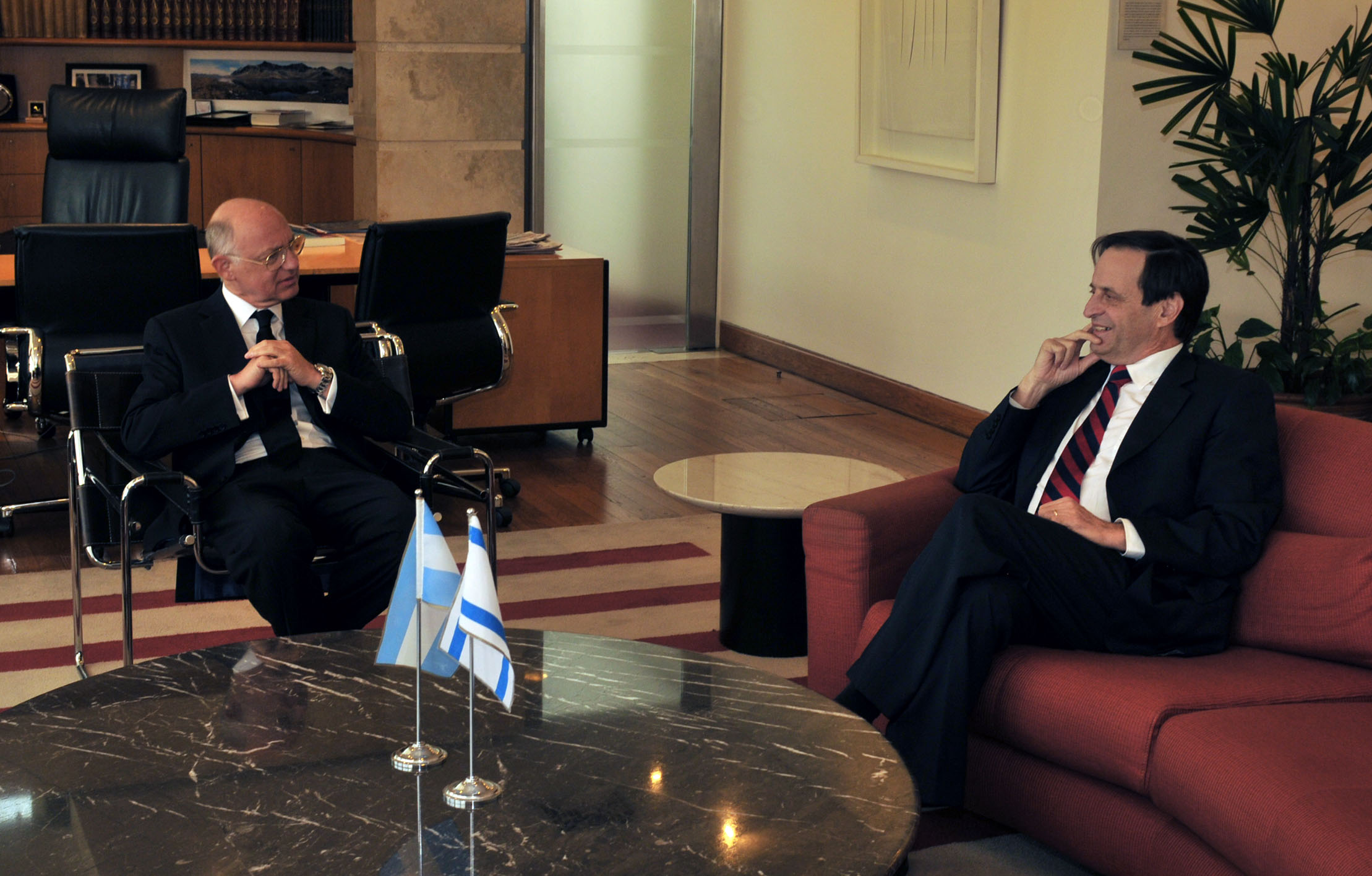 Buenos Aires, 14 de noviembre de 2011 - El Canciller Héctor Timerman recibió hoy en su despacho al Vice Primer Ministro de Israel, Dan Meridor, con quien repasó la agenda bilateral y analizó la situación en Medio Oriente. foto Roberto Daniel Garagiola